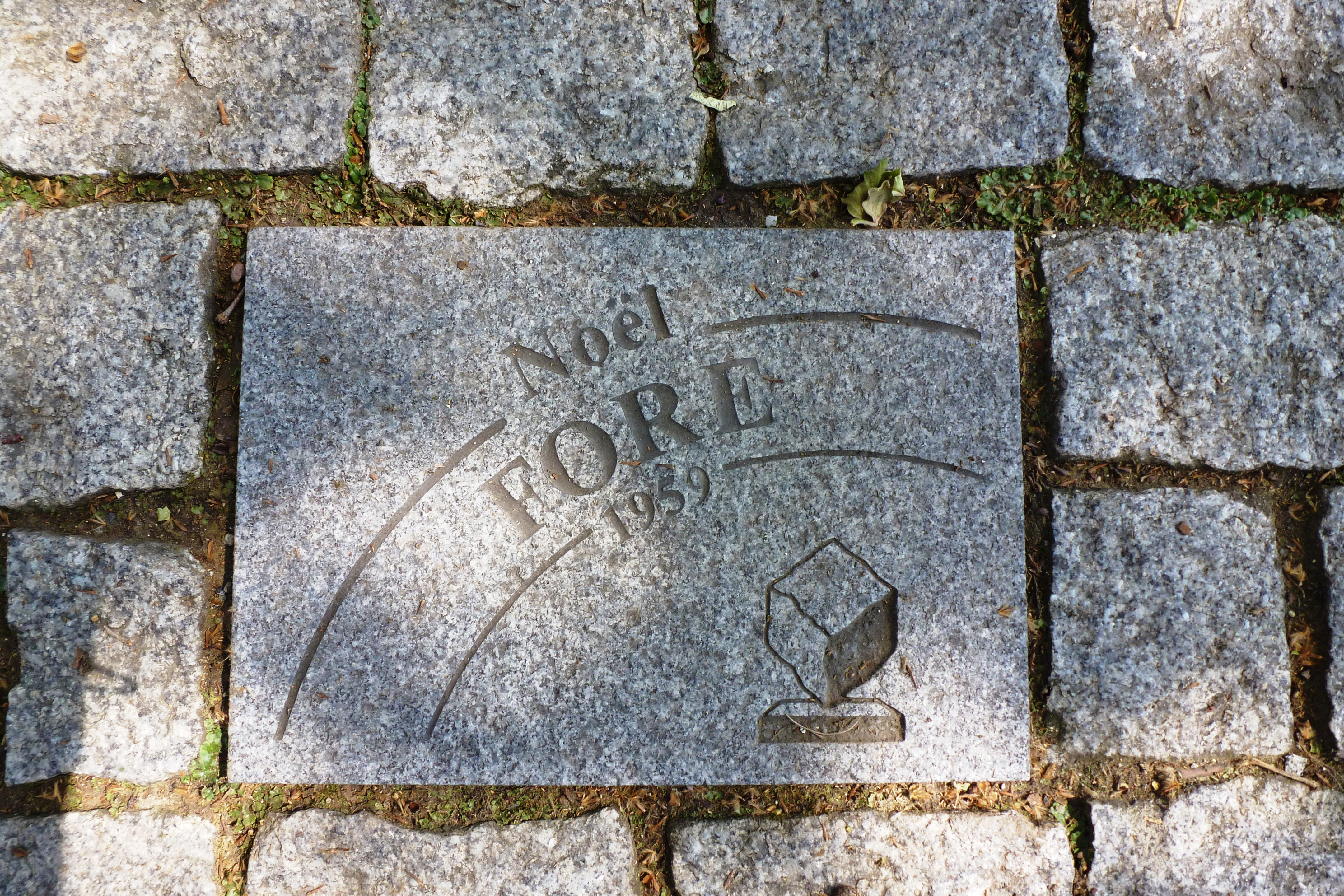 Pflasterstein für Noël Foré auf der Allée Charles Crupelandt in Roubaix